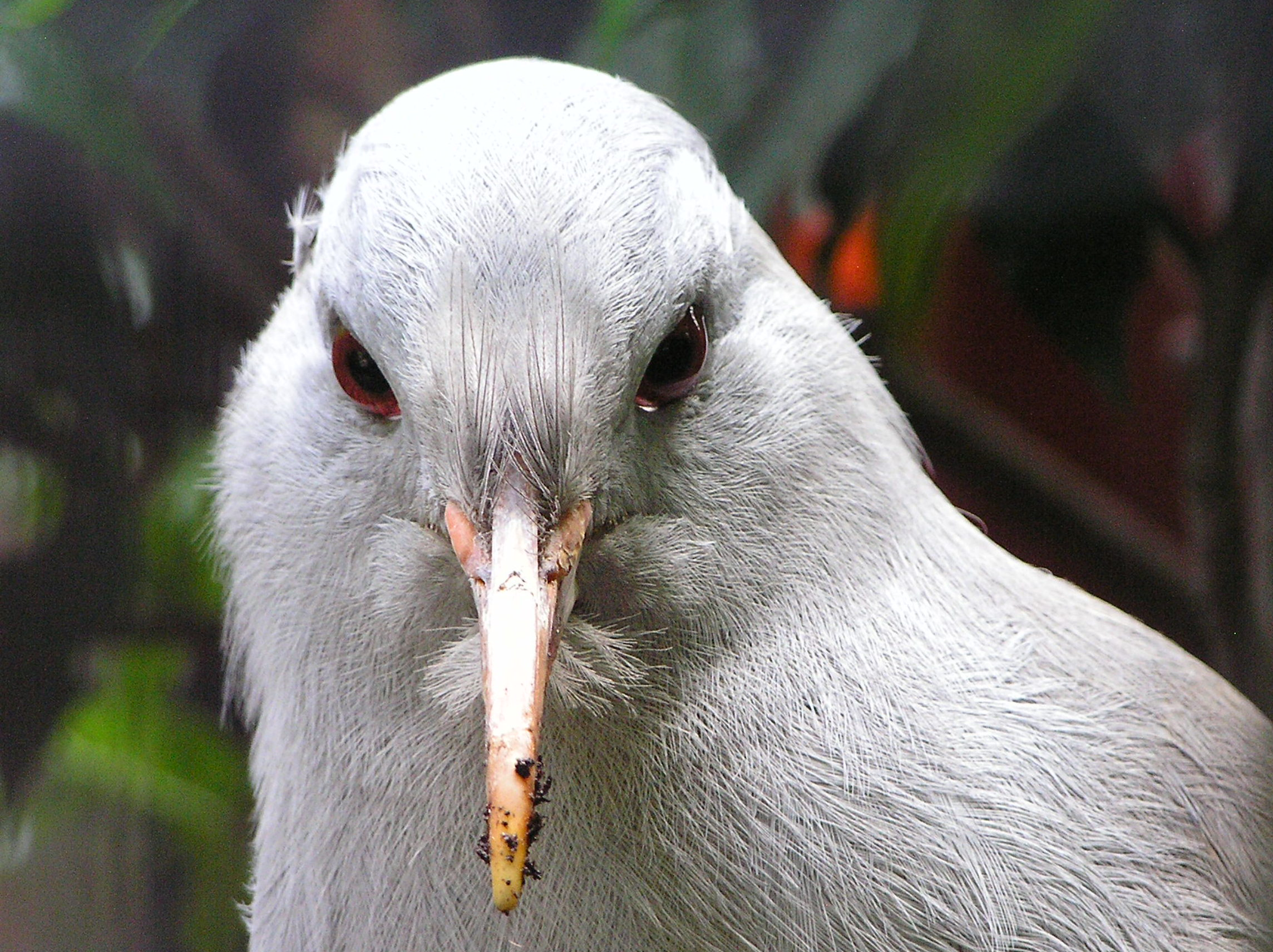 Kagu (French: Cagou), Rhynochetos jubatus